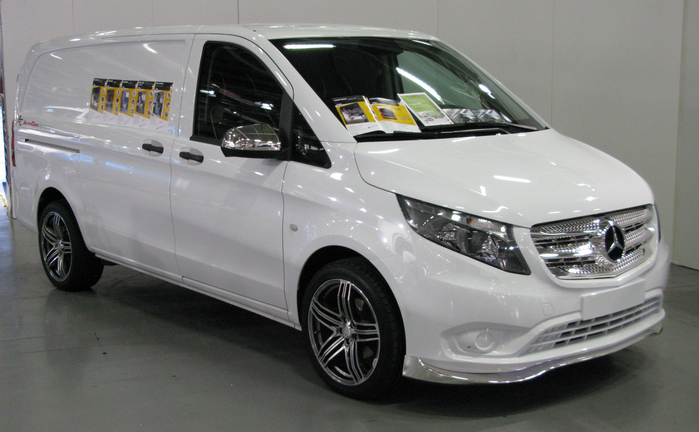 Mercedes-Benz Vito